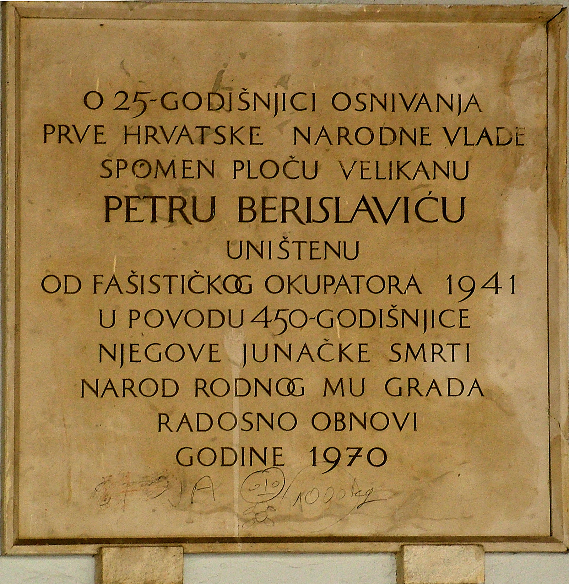 Beriszló Péter emléktáblája Trogirban (Horvátország)